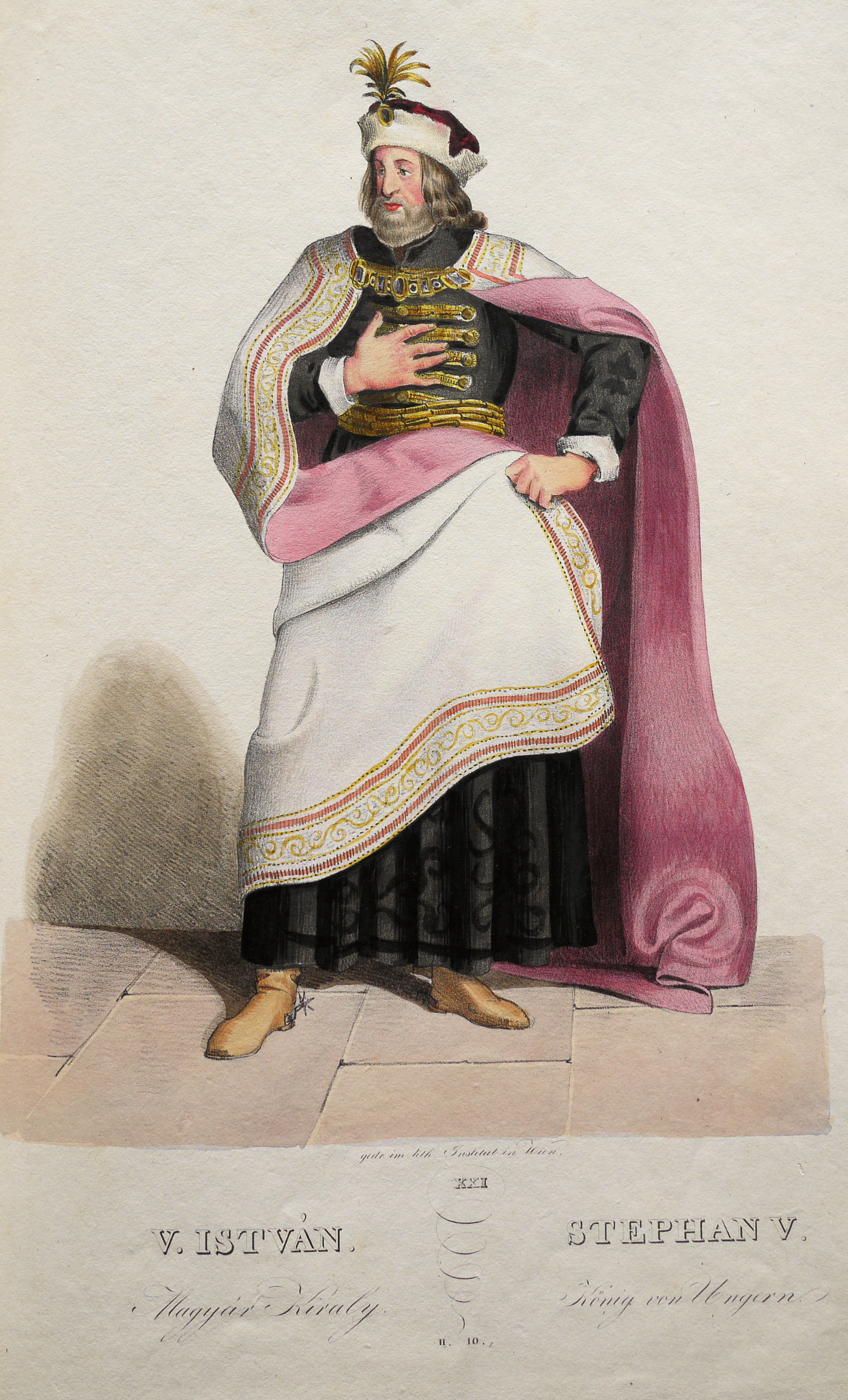 Stephan V. (1239-1272), König von Ungarn etc.; Lithographie von Josef Kriehuber nach einer Zeichnung von Moritz von Schwind aus Ungerns Erste Heerführer Herzoge und Koenige In einer Reihe von Bildnissen von Bela bis auf Seine Majestät Franz I. Kaiser Von Österreich König Von Ungern &c., &c. Wien : Lithographisches Institut ;ca. 1828